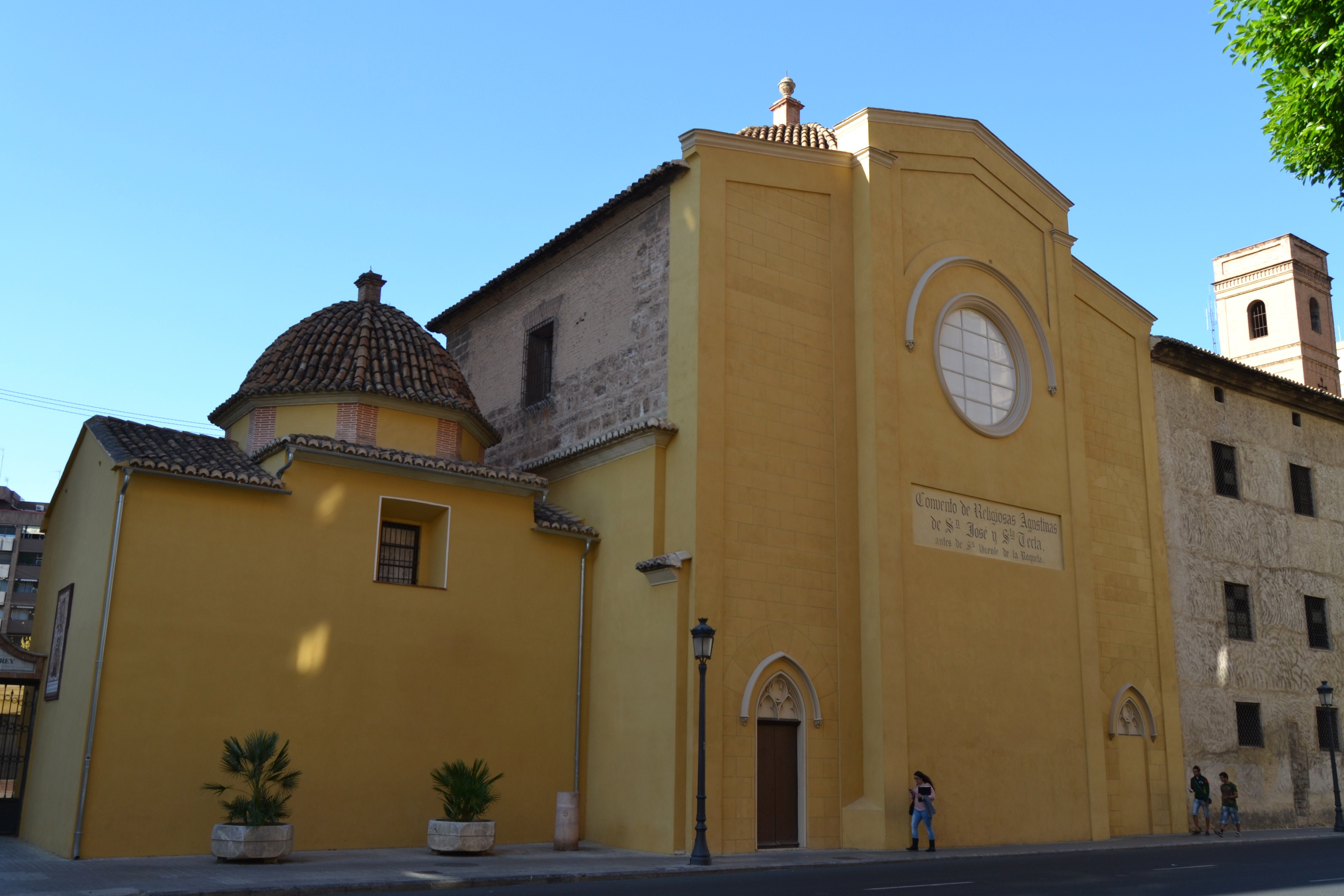 València, sant Vicent de la Roqueta.